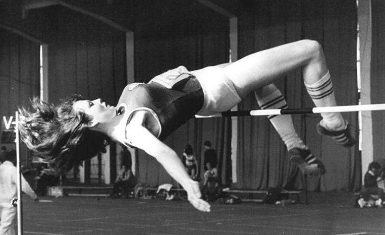 Andrea Bienias ADN-ZB Weisflog 18.1.86 Schwedt: Gute Leistung durch Bienias. Siegerin beim sechsten Hochsprung mit Musik wurde Andrea Bienias (SC DHTK Leipzig, Foto von einem früheren Wettkampf) mit ausgezeichneten 1,97 m. An der 2-Meter-Marke scheiterte sie nur knapp.